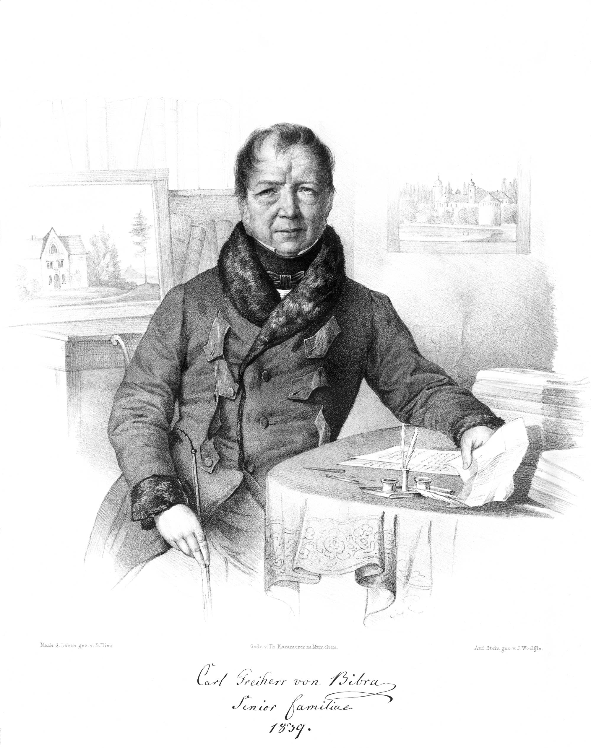 Carl Friedrich Wilhelm Gottlob von Bibra (13. Januar 1770 in Oberlind; † 26. Oktober 1842) “Nach d. Leben gez. v. S. Diez” “Gedr. V. Th. Kammerer in München” “Auf Stein gez. v. J. Woelfjle” Familie Senior 1832-1842